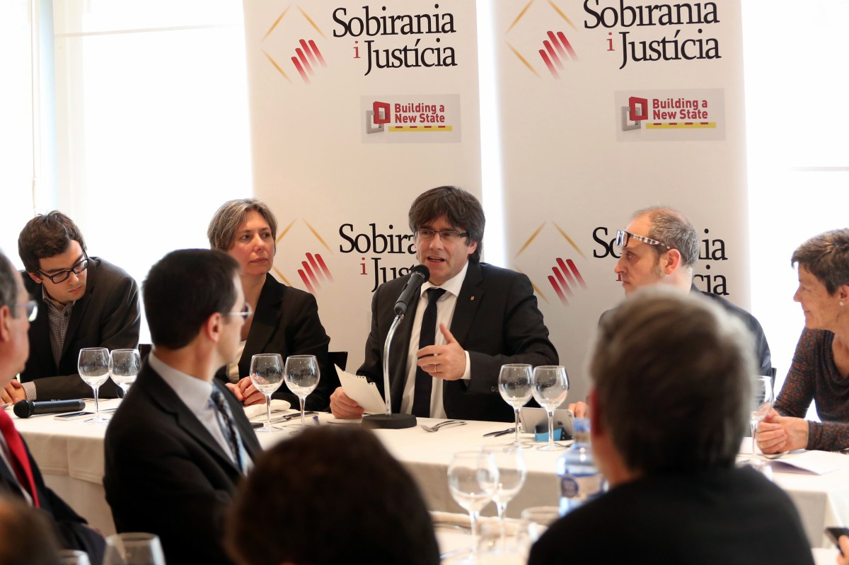 Dinar Àgora amb el president del Govern de Catalunya, Carles Puigdemont (Barcelona, 11 de març de 2017)